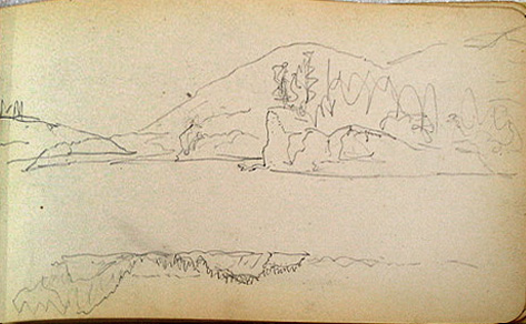 Página do caderno de esboços de Albert Bierstadt, Mabee-Gerrer Museum of Art.